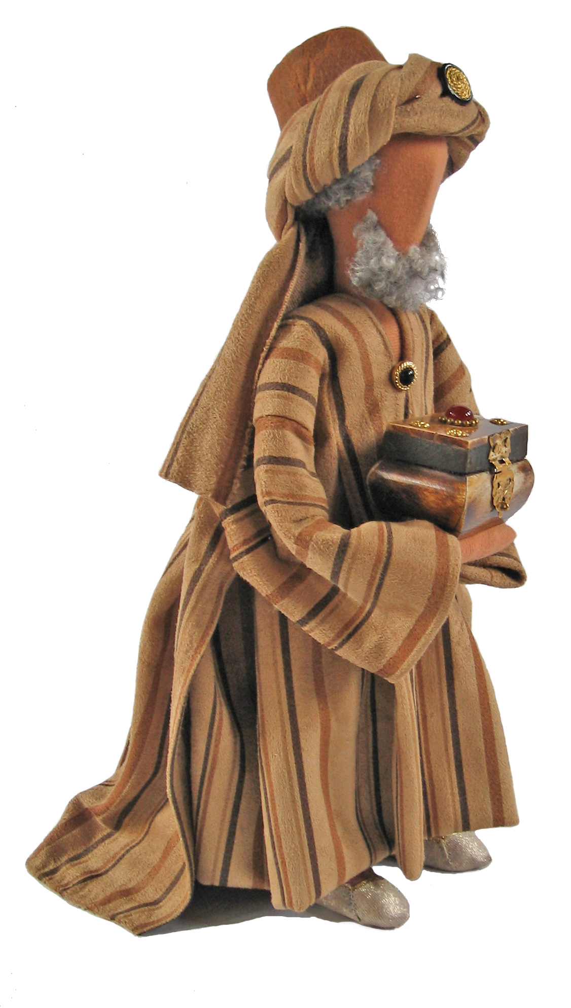 Biblical Narrative Figure - Magi.